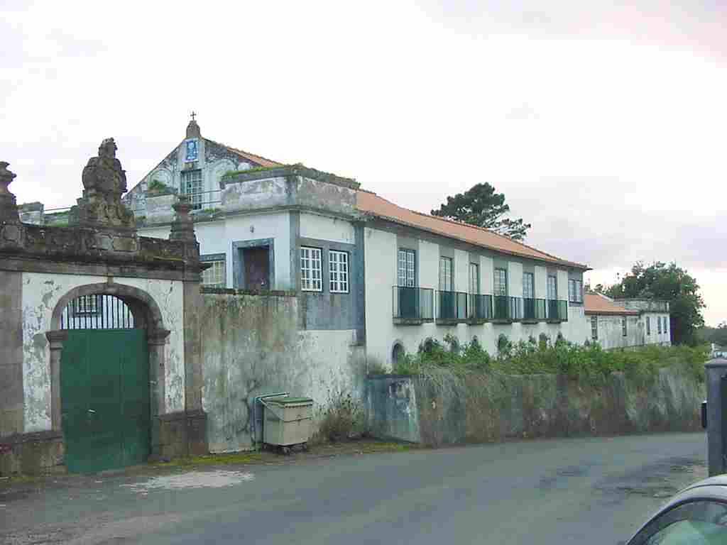 Quinta da Boa Hora, vista geral